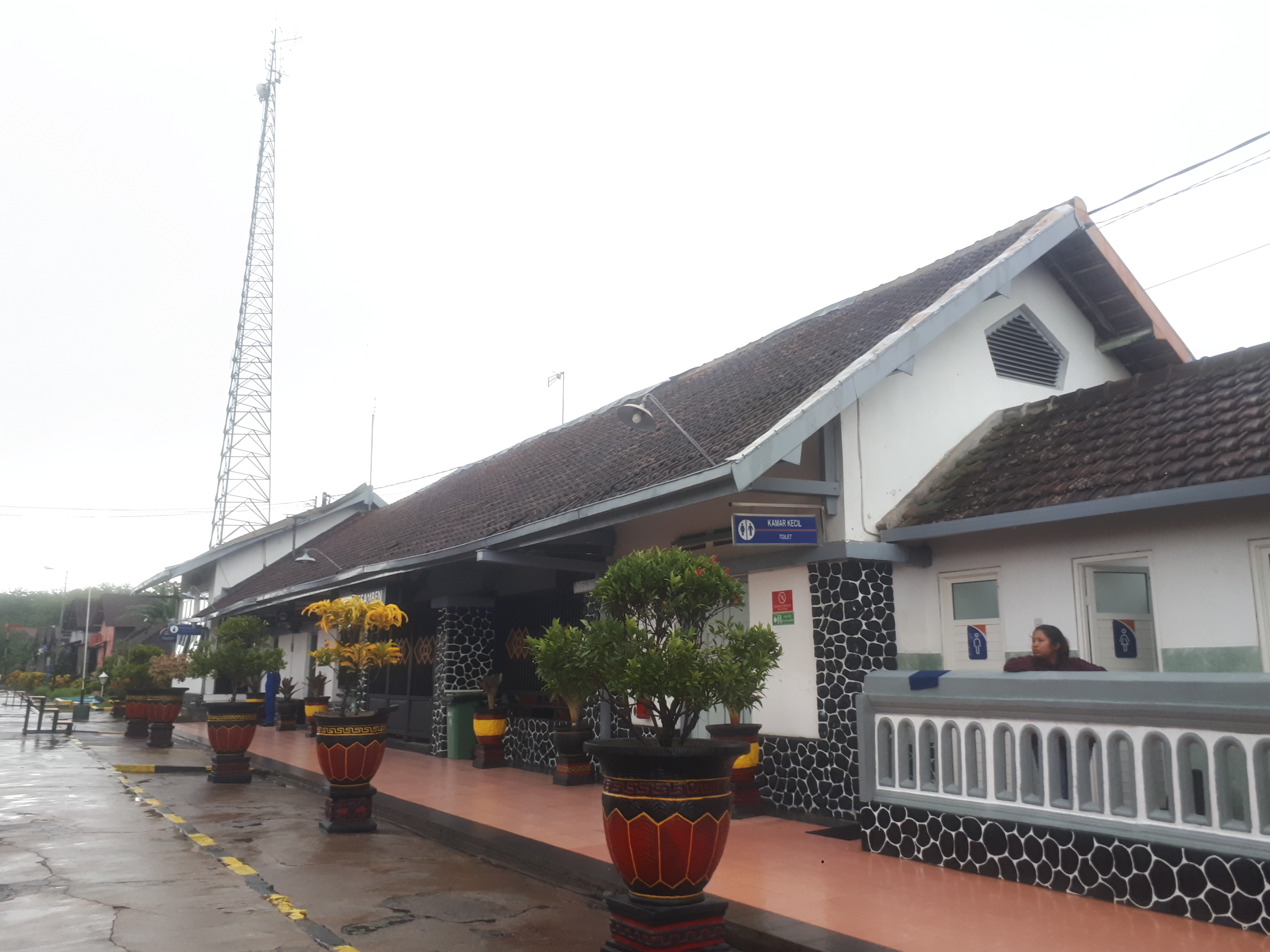 Stasiun Kesamben pada tahun 2020